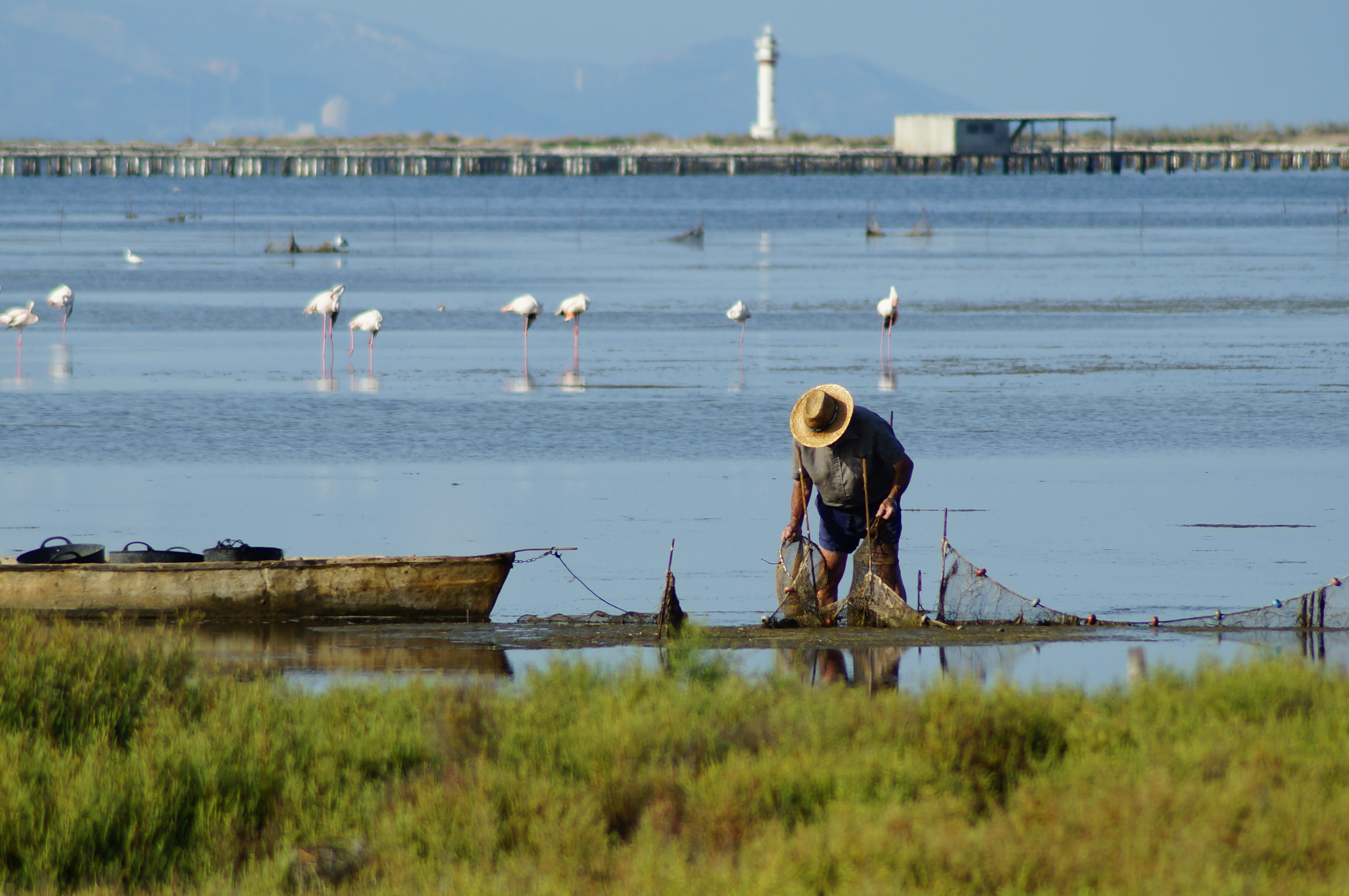 Pescador recollint la captura a la Badia del Fanagr del Delta de l'Ebre This is a photography of a Special Area of Conservation in Spain with the ID: ES0000020. Natura2000 entry, EEA entry